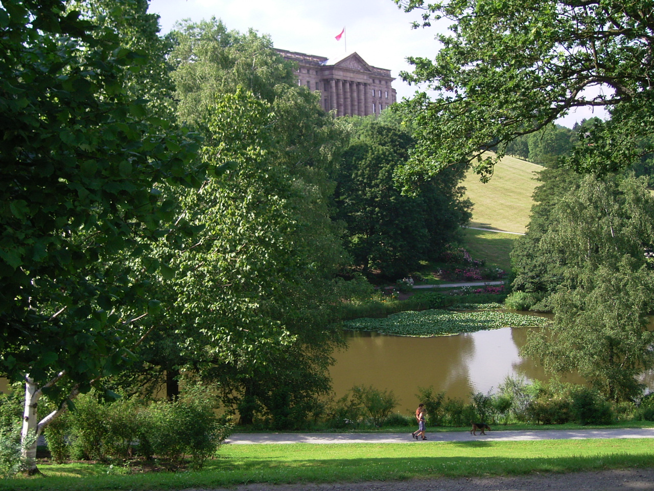 Beschreibung: Bergpark Wilhelmshöhe, Lac Quelle: selbst photographiert Photograph: Hafenbar 20:55, 20. Jul 2005 Hafenbar 1280 x 960 (679264 Byte)